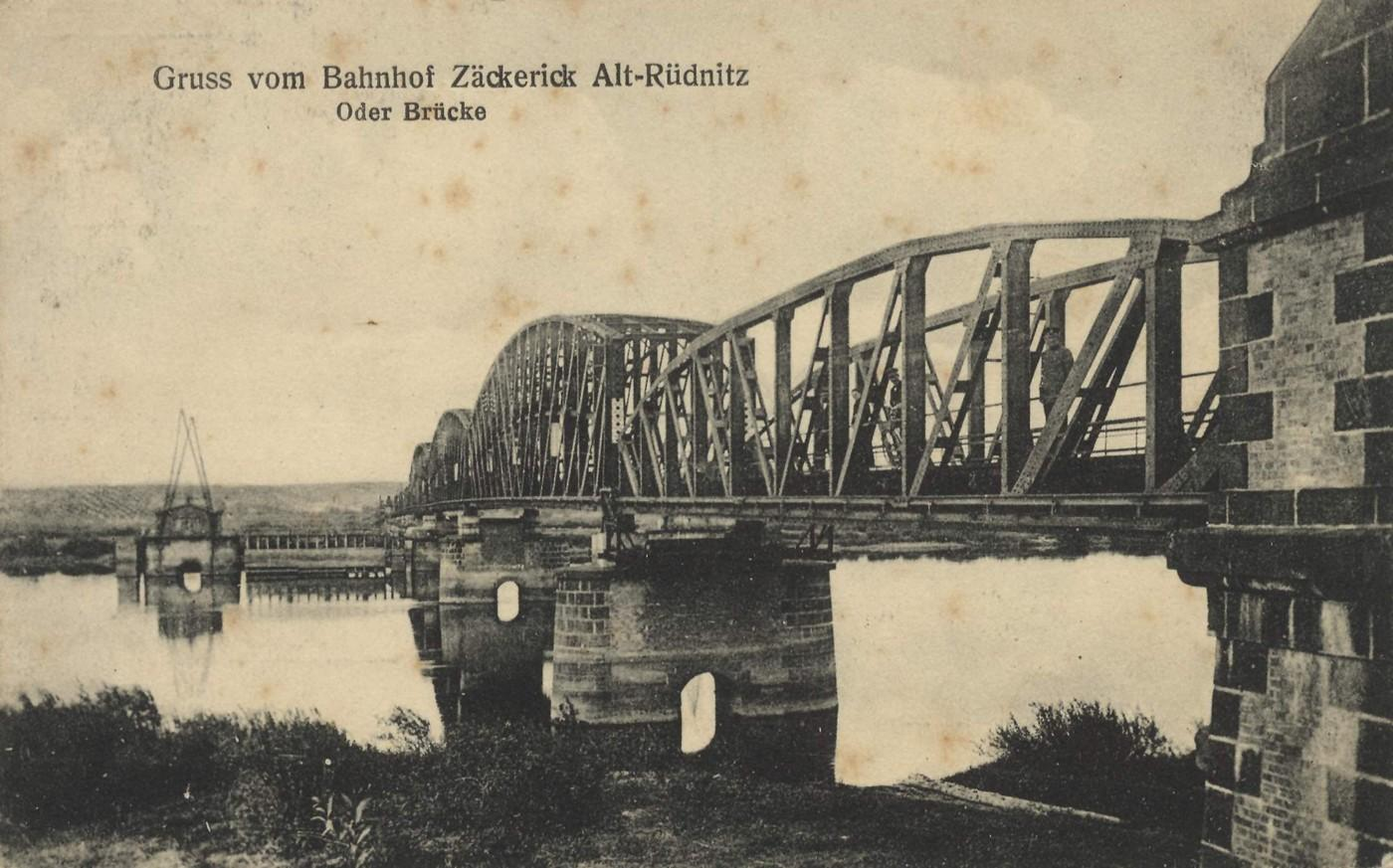 Postkarte Gruss vom Bahnhof Zäckerick Alt-Rüdnitz, Oder Brücke, c. 1910/1920